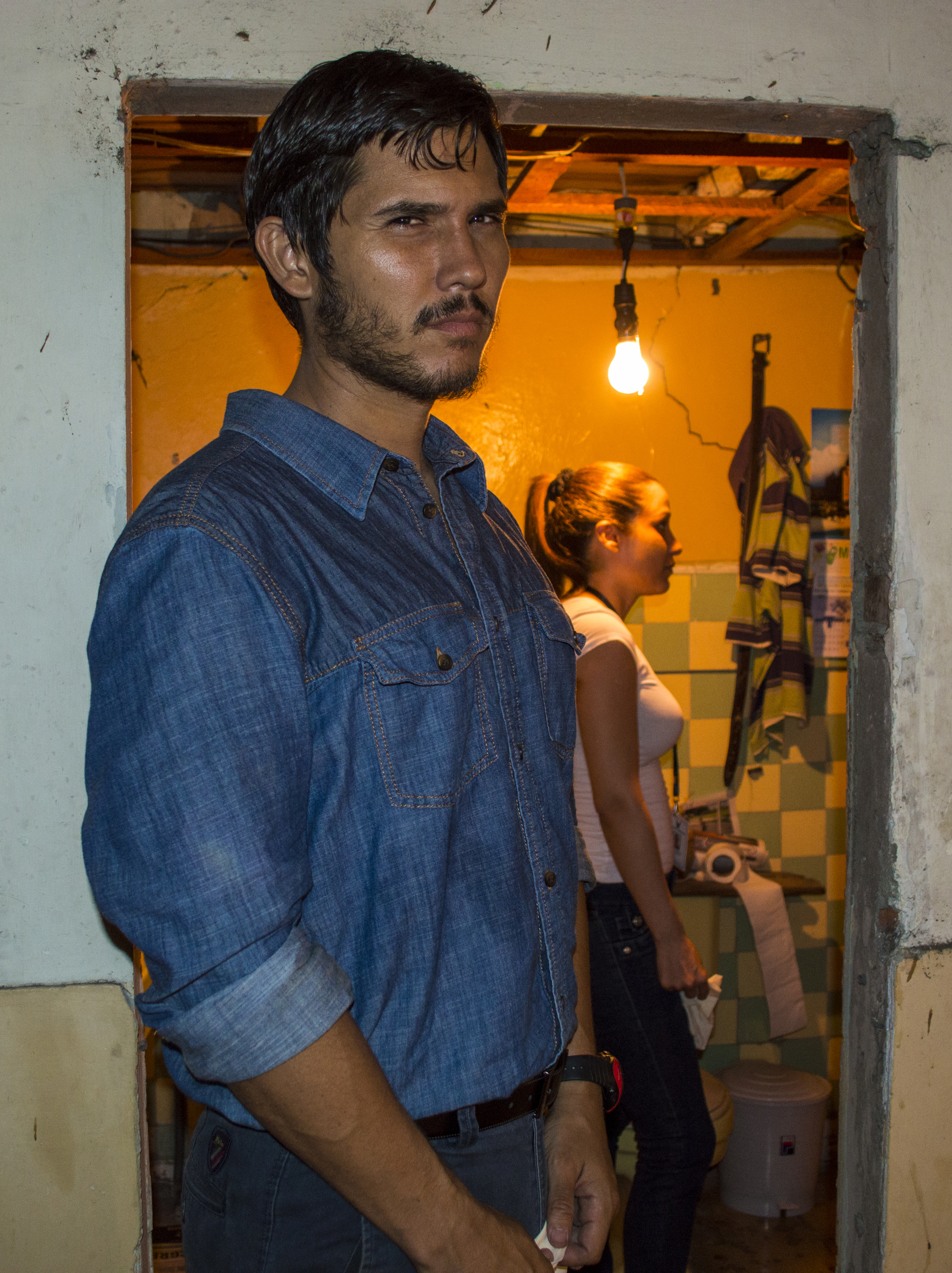 Juan Pablo Asanza en 2015 durante el rodaje de las primeras escenas de Entre Sombras: Averno.